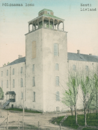 Vaade Põltsamaa lossile.